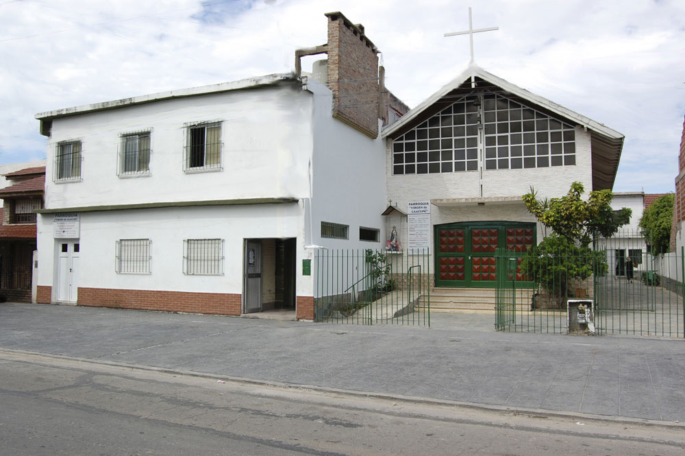 Parrocchia Vergine de Caacupé - chiesa y salone